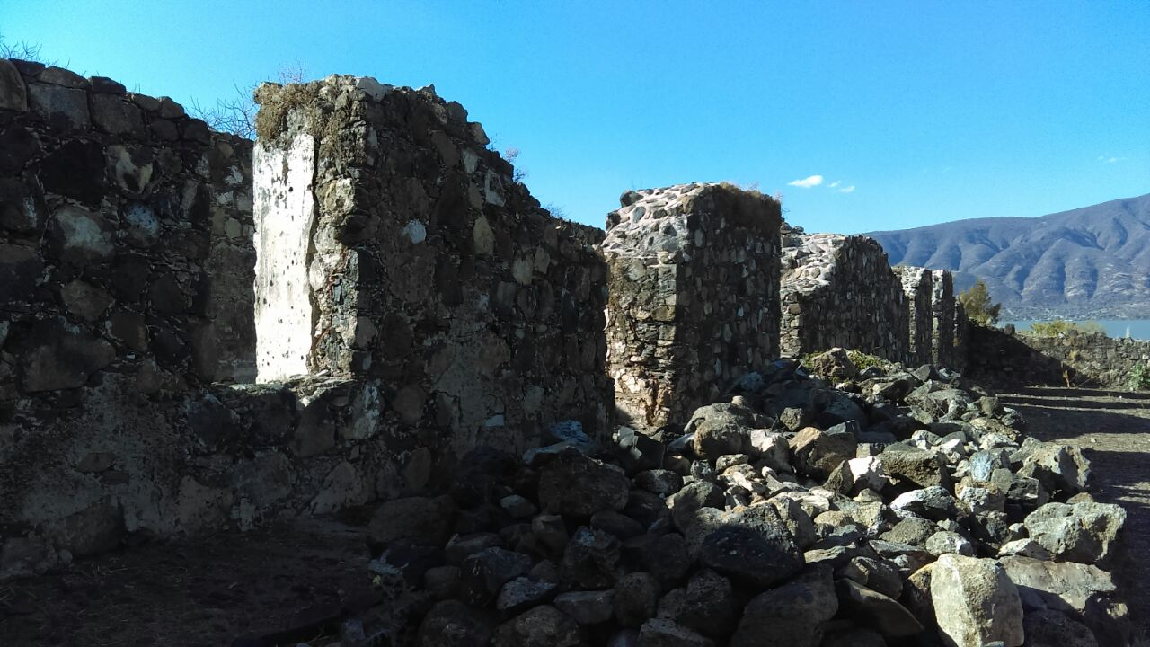 Cuertel Viejo ubicado en la Isla de Mezcala.